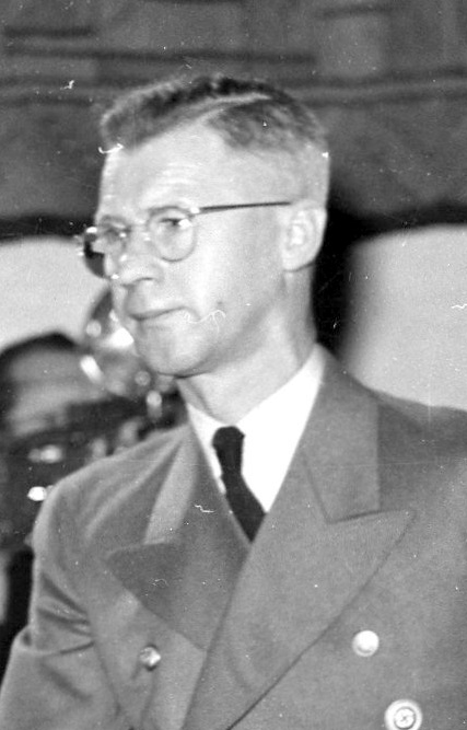 Josef Terboven under statsakten på Akershus 1. februar 1942. RA/RAFA-3309/U 39A/ /16 img173